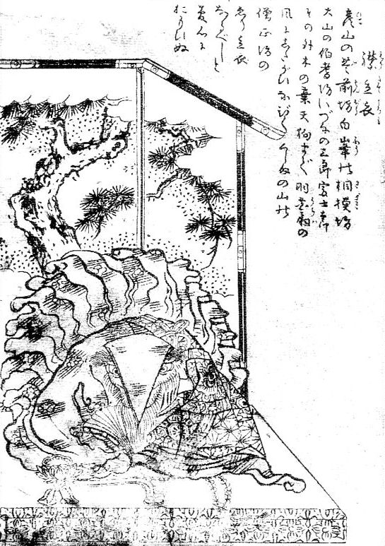 Eritate-goromo (襟立衣) from the Gazu Hyakki Tsurezure Bukuro (百器徒然袋)